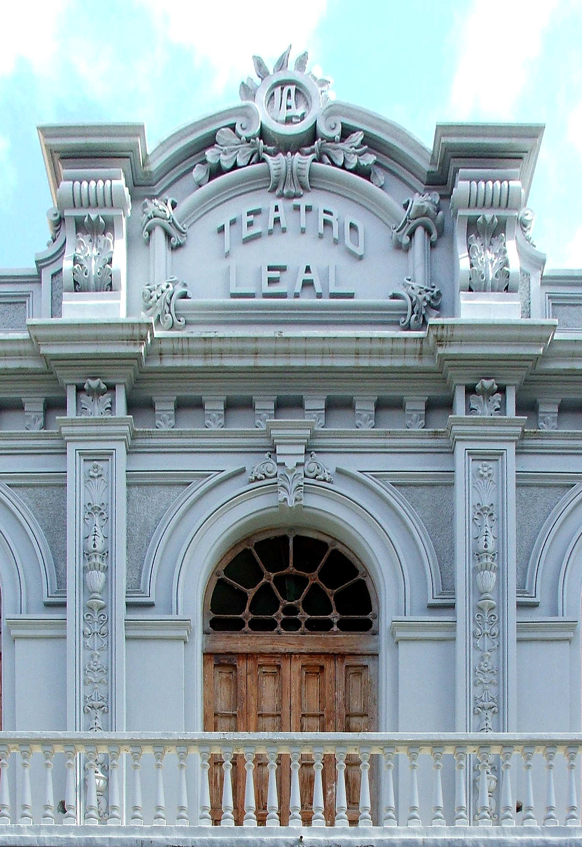 El Teatro Leal, La Laguna